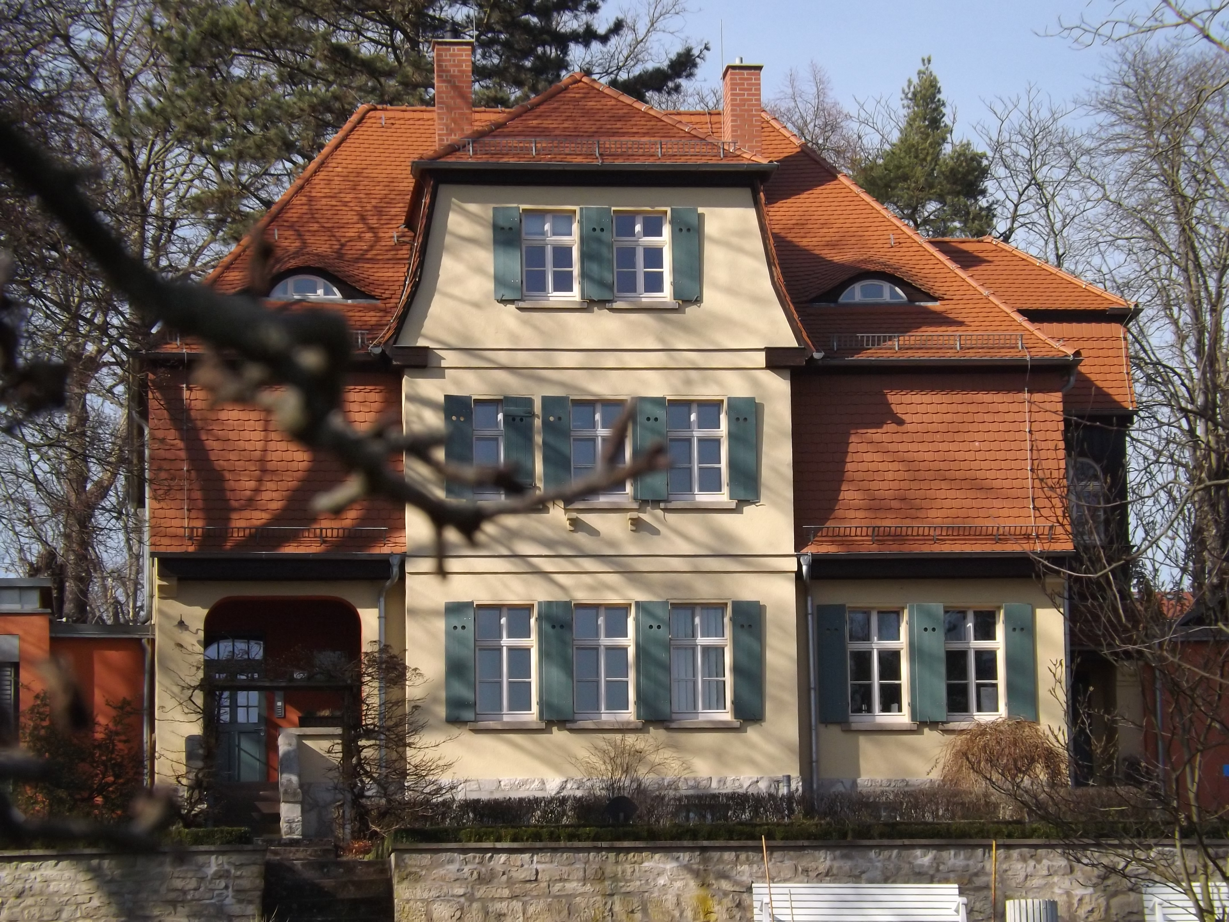 Krüger-Villa in Neudietendorf von Südosten. Im Vordergrund ein kleiner Terrassenpark mit Kräutergarten, westlich anschließend botanisch-dendrologischer Garten.